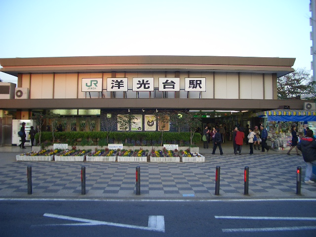 Yōkōdai Station, Negishi Line, Isogo-ku, Yokohama, Kanagawa, Japan (:ja:洋光台駅)